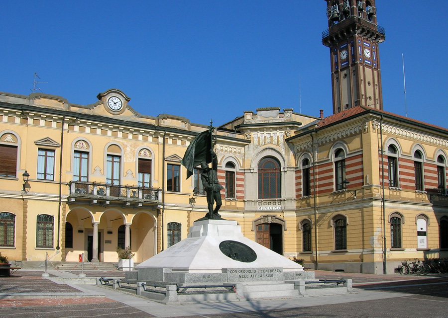 Il monumento ai caduti di fonte al municipio di Mede. Alle spalle l'alto campanile della parrocchiale (63 metri)